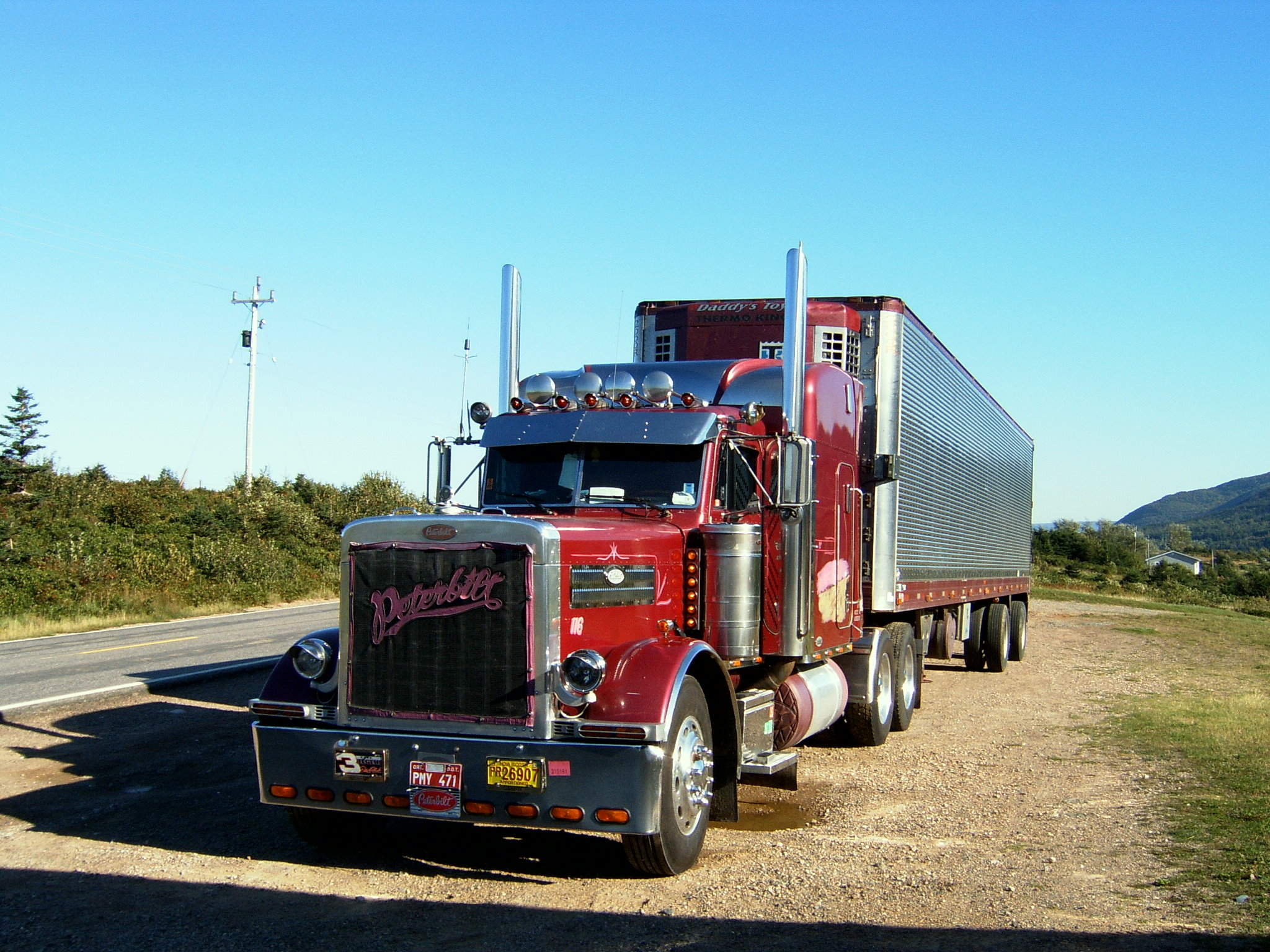 LKW-Typ: Peterbilt